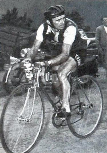 Jean Robic en 1953, 'Sprint 71', Panini figurina n°223.